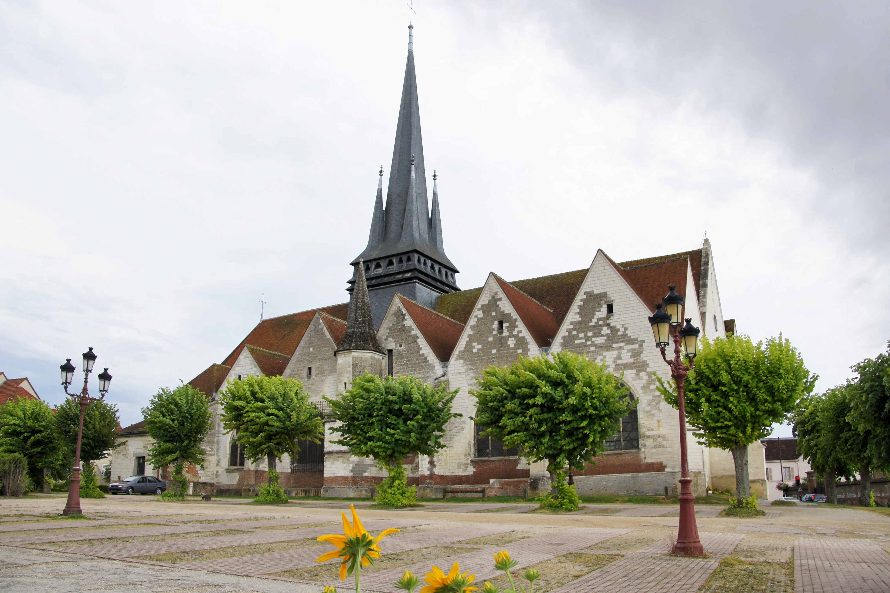 L'église de Saint André Les Vergers (10) datant du XVI ième siècle